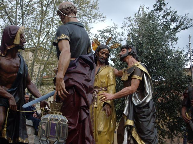 Paso del Prendimiento, obra de Damián Villar. Salamanca, España